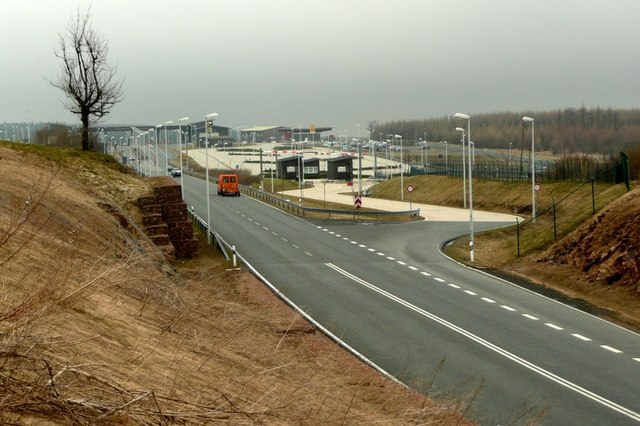 Blick auf die ehemalige Gemeinschaftszollanlage Altenberg an der B 170 (E 55)